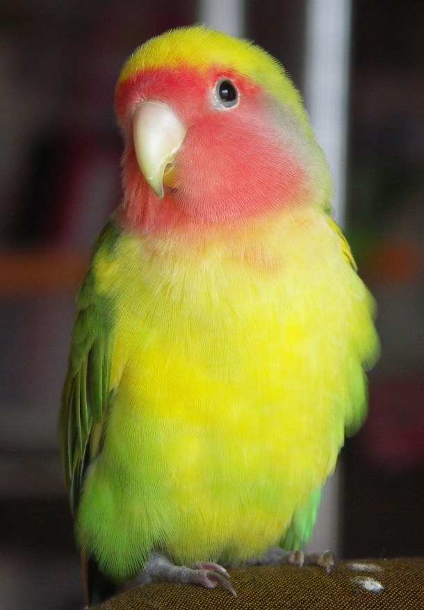 Rosy-faced Lovebird TigerCherry／コザクラインコ色変種「イエローパイド（タイガーチェリー）」